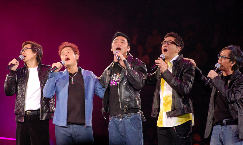 Wynners